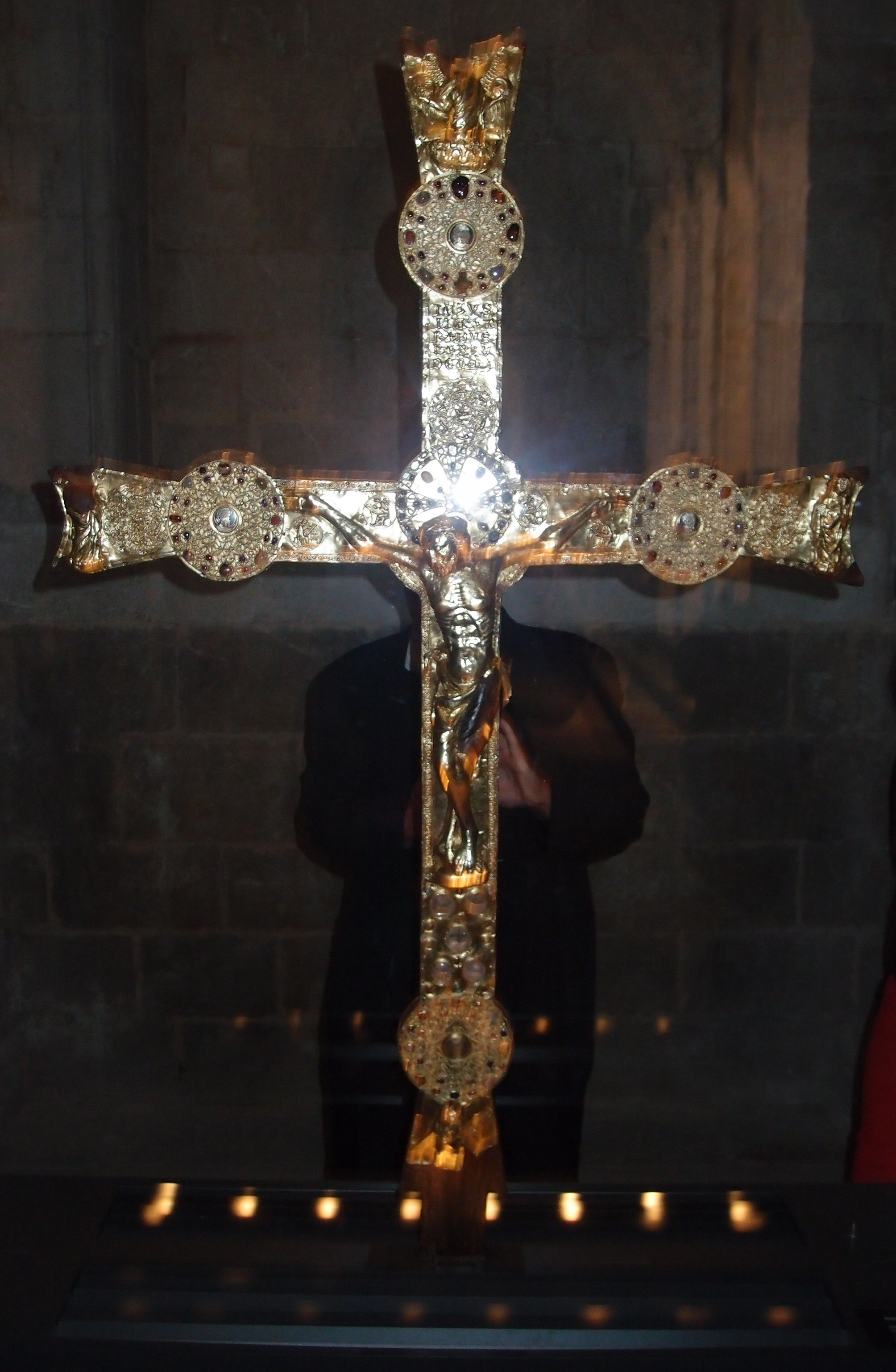 Kloster Santa Maria de Vilabertran - got. Kreuz (14. Jh.) (Alt Emporda / Katalonien) Datum: 14. Jahrhundert Urheber: katalanischer Silber-/Goldschmied Foto: M. Pfeiffer alias Gordito1869 (Panoramafreiheit in Spanien) Quelle: privates (eig.) Fotoarchiv